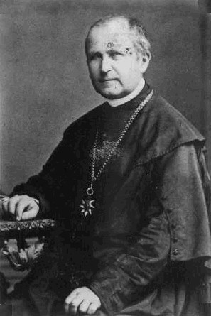 František Demel (1823 - 1900), Český římskokatolický kněz.